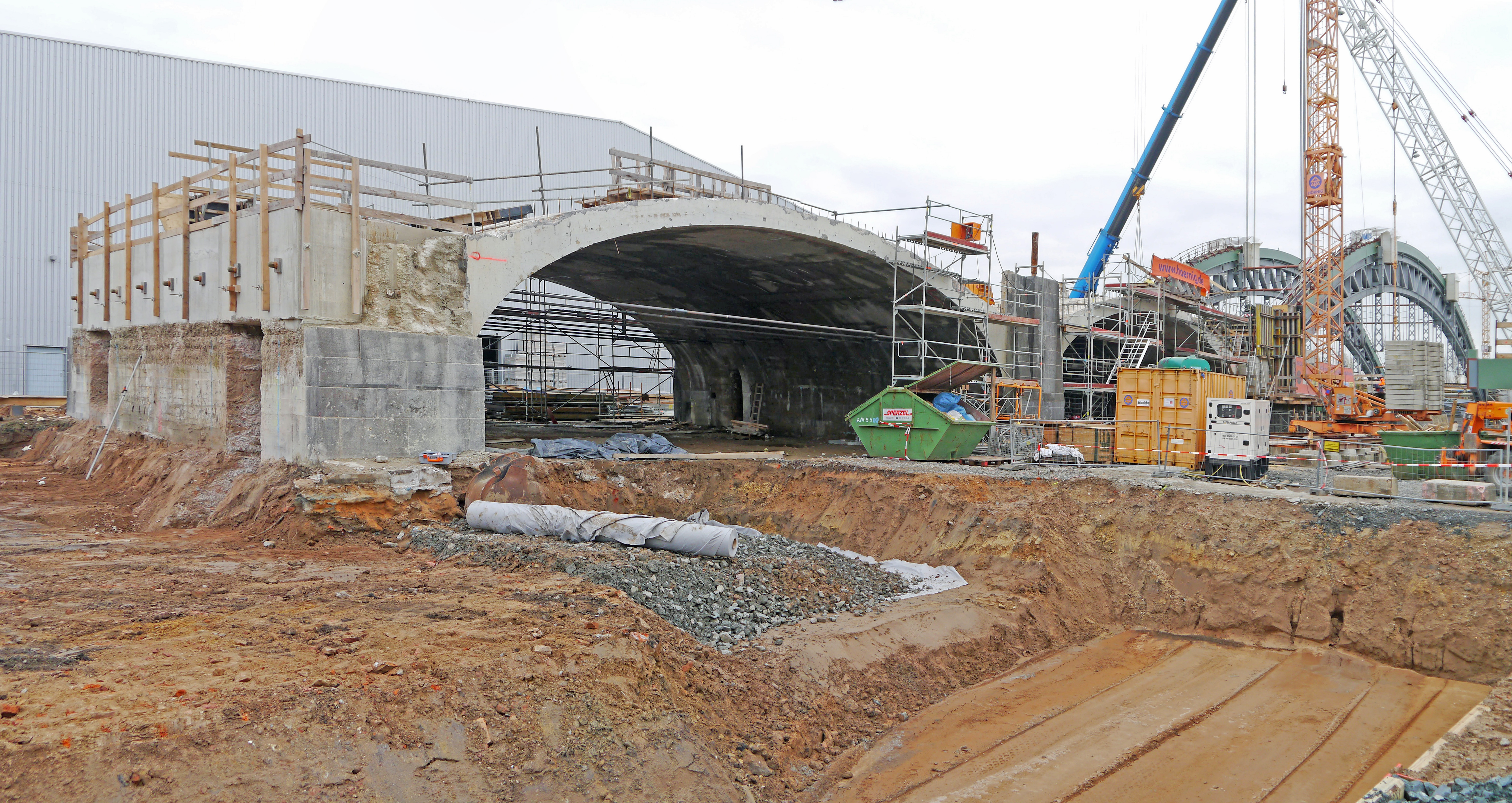 Die Honsellbrücke während der 2. Phase der Grunderneuerung: das Einhängen der Fahrbahn. Im November 2012 in Frankfurt am Main. Ansicht von der Osthafen-Park-Seite..